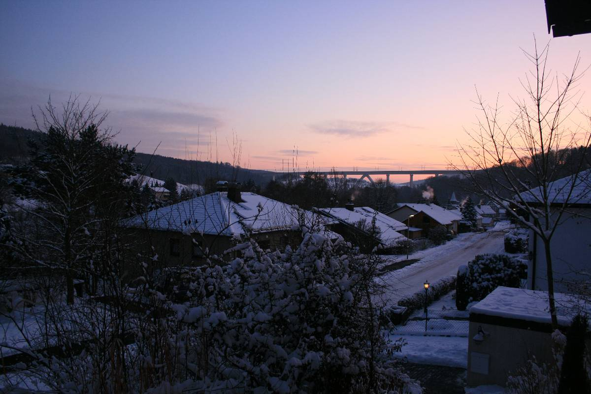 Empfershausen im Winter 2010